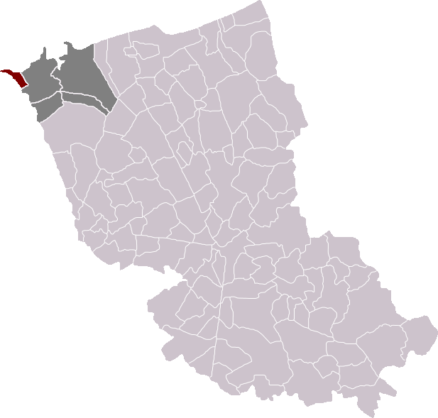 Locatie gemeente Groot-Fort-Filips in arrondissement Duinkerke. Zelfgemaakt. Location of Grand-Fort-Philippe municipality in the arrondissement of Dunkirk. Self made. Localisation de la commune de Grand-Fort-Philippe dans l'arrondissement de Dunkerque. Fait moi-même.